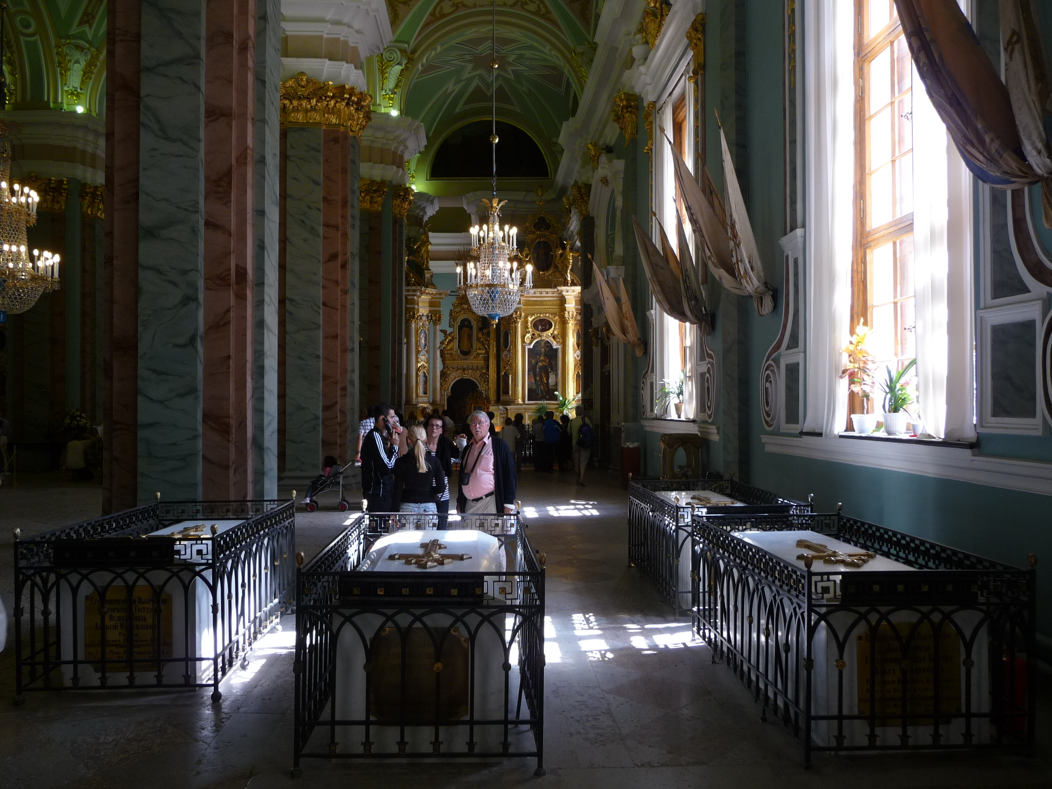 RussianTzarsTumbs-p1030578.jpg